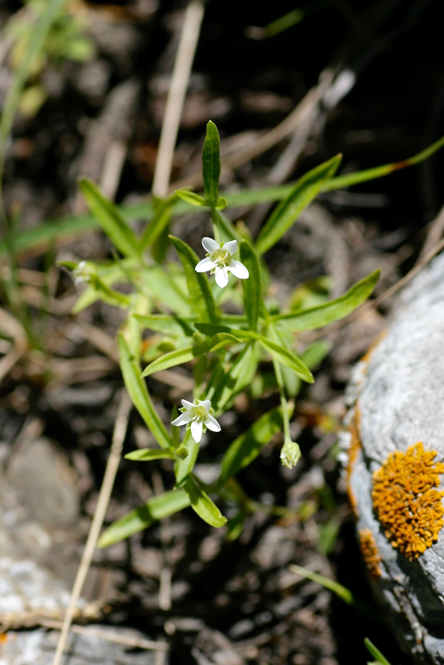 Kyrgyzstan, Alay, Suu-Bashi, close to Allauddin river. 2700 m. Кыргызстан, Баткенская обл., Кадамжайский р-н, 20 км на ЮВ от г. Айдаркен, Алайский хр., урочище Суу-Баши, долина р. Аллауддин, в арчовнике, 2700 м н.у.м. 30 июня 2009 г.